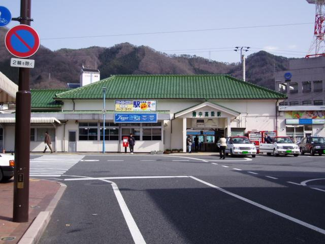 West Japan Railway Hakubi Line Bitchū-Takahashi Station 西日本旅客鉄道 伯備線 備中高梁駅